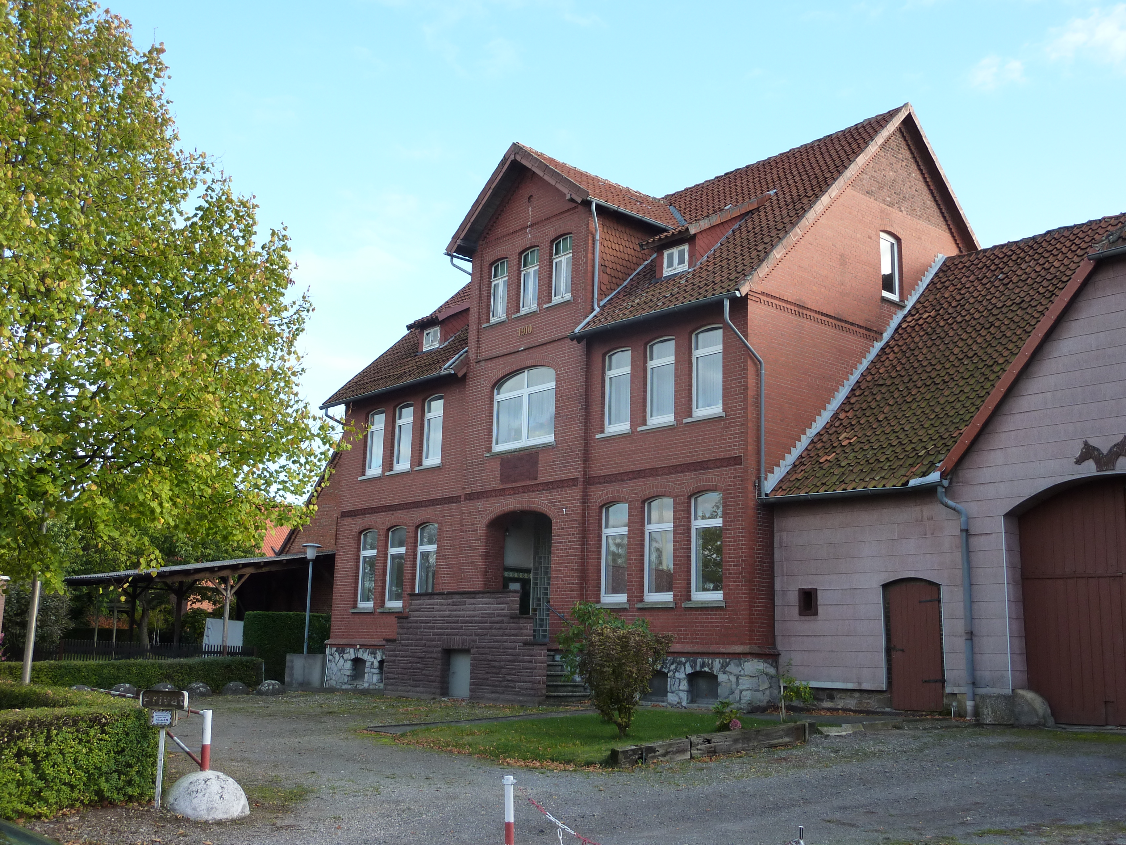 Älteres Bauwerk (1910) in Linderte